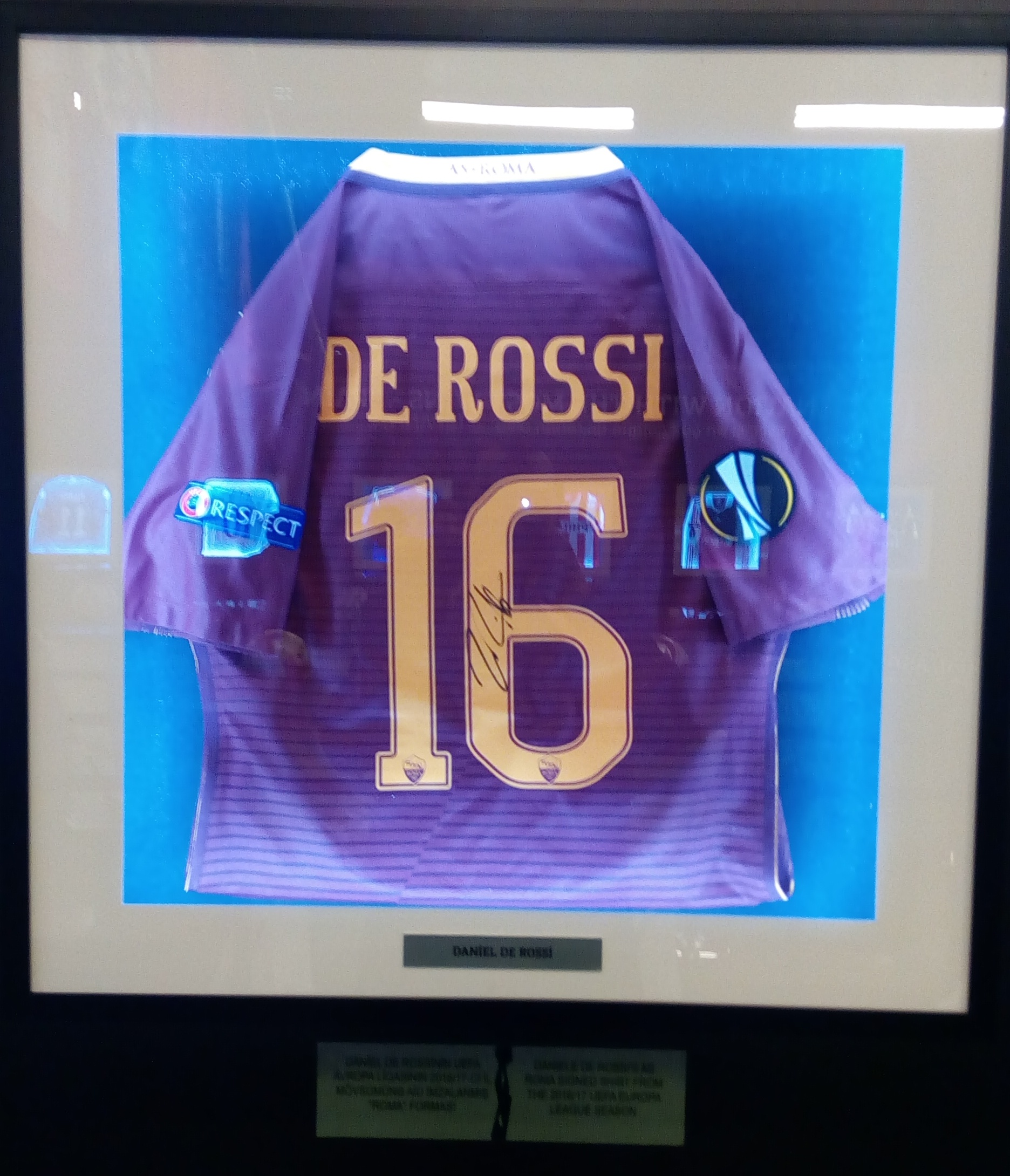 Avropa Liqası Muzeyi Bakıda